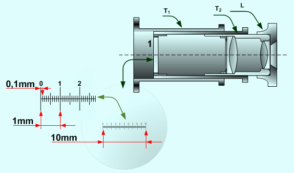 Dinaméter